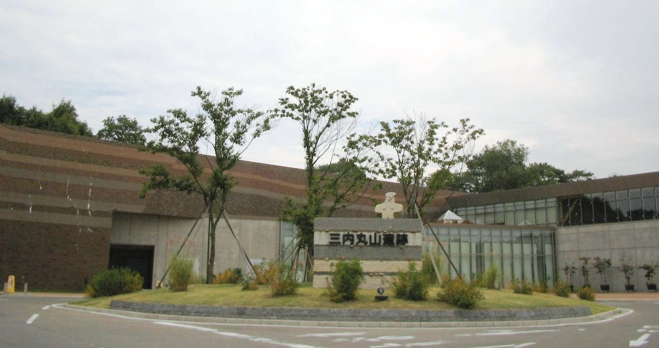 三内丸山遺跡。Sannai Maruyama site, Aomori.